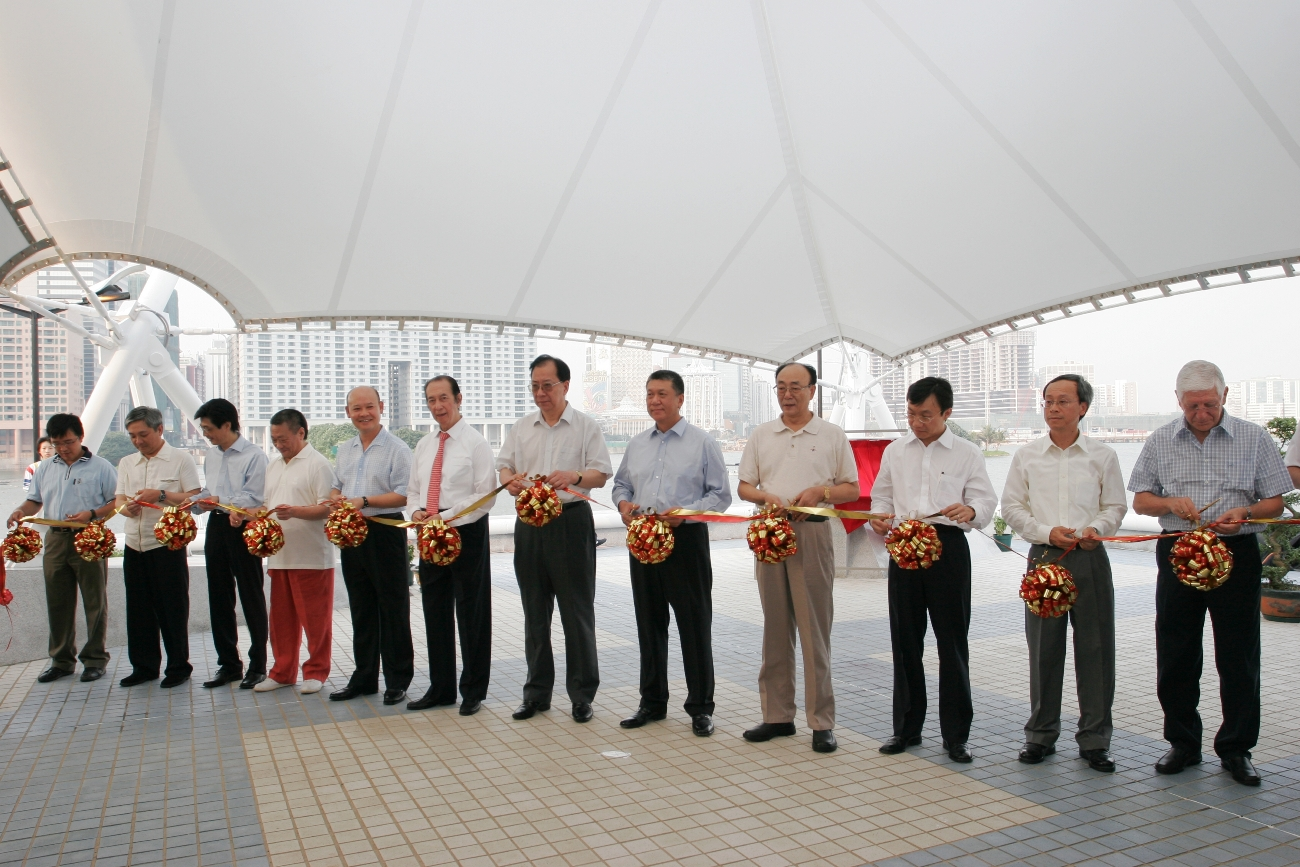 Cerimônia de abertura do Centro Náutico da Praia Grande